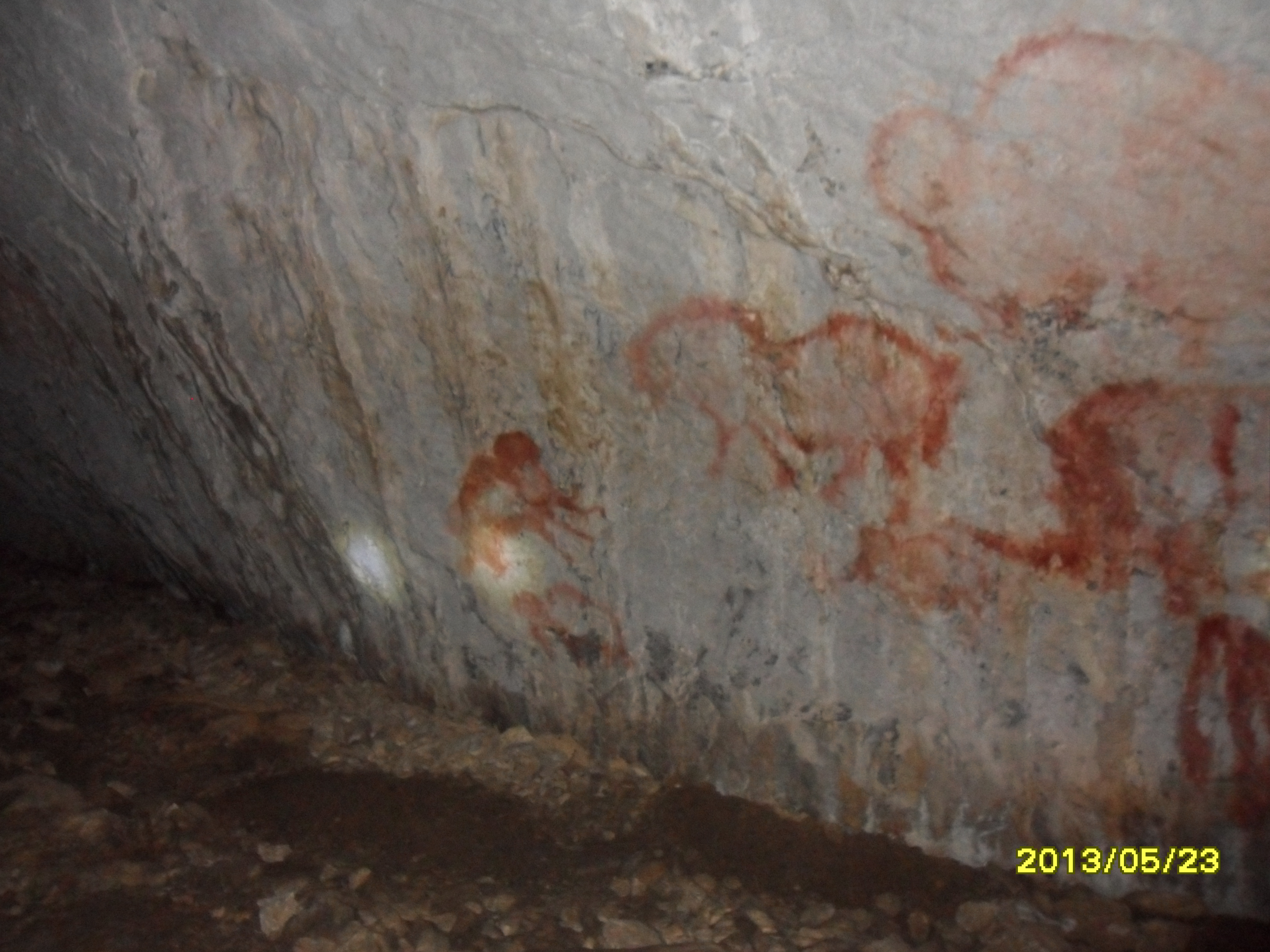 Капова пещера (Шульган-Таш), Бурзянский район This image is related to the protected area of Russia number 0220101